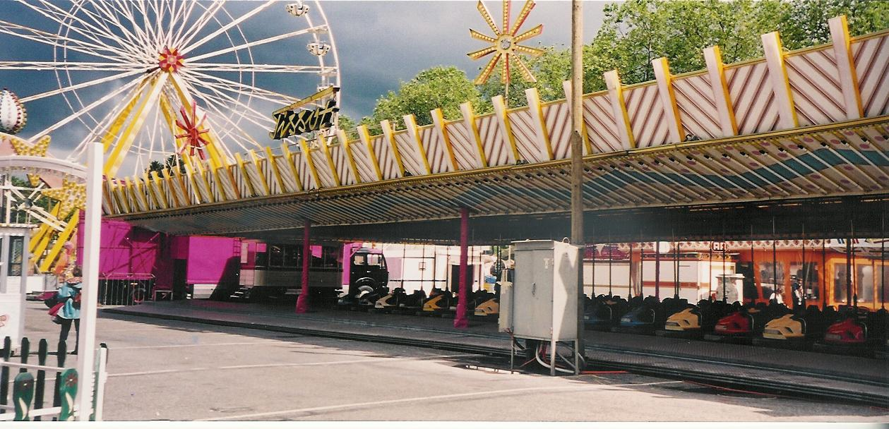 Auto Tamponneuse à Lausanne Bellerive (Suisse)